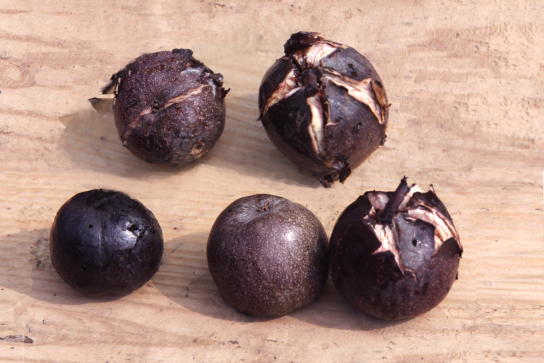 紫京核桃果